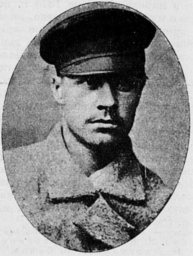 Фотопортрет Василя Донецького, 1880 рік. Фото із фондів "Музею революції СРСР".